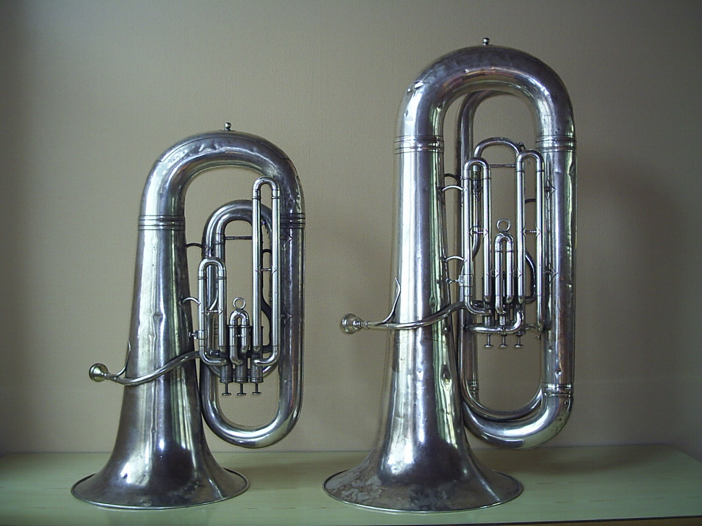 Två bastubor: vänstra tuban är stämd i Eb och högra tuban är stämd i Bb. Fotograf:Tubaist. 23 september 2005 kl.14.44 Tubaist 1024x768 (286449 bytes) (Två bastubor : vänstra tuban är stämd i Eb och högra tuban är stämd i Bb. Fotograf:~~~~ GFDL )